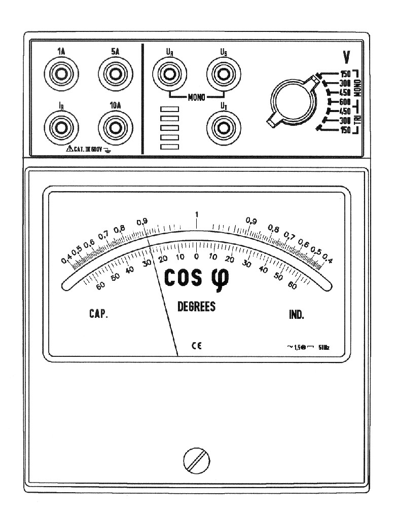 Hordozható ferrodinamikus fázismutató. ( cosφ mérő)